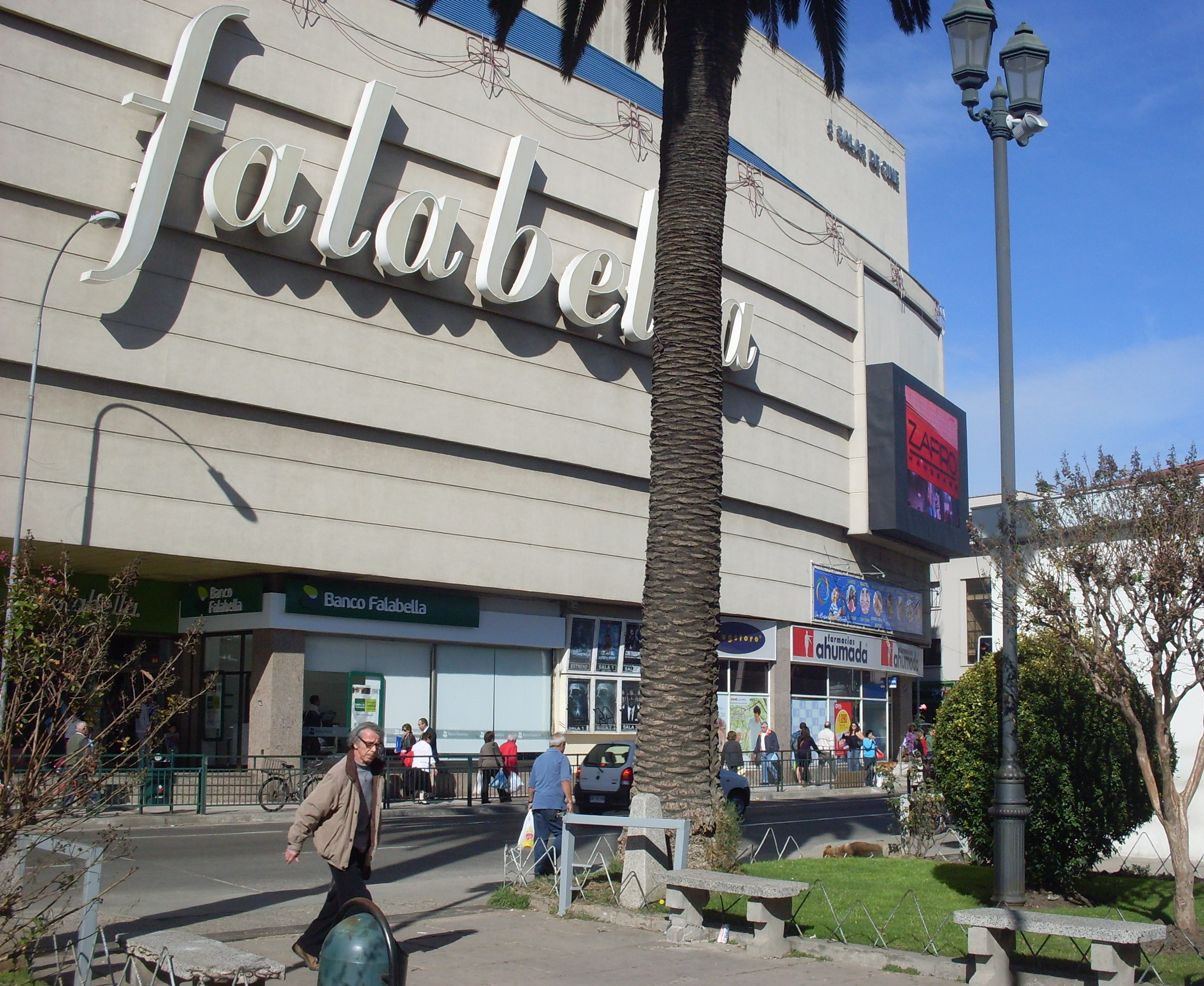 Mall Plaza del Sol, de la ciudad de Quilpué, Chile, observado desde la Parroquia de Nuestra Señora del Rosario, por calle Diego Portales.